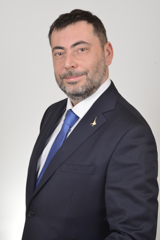 Luigi Augussori, politico italiano